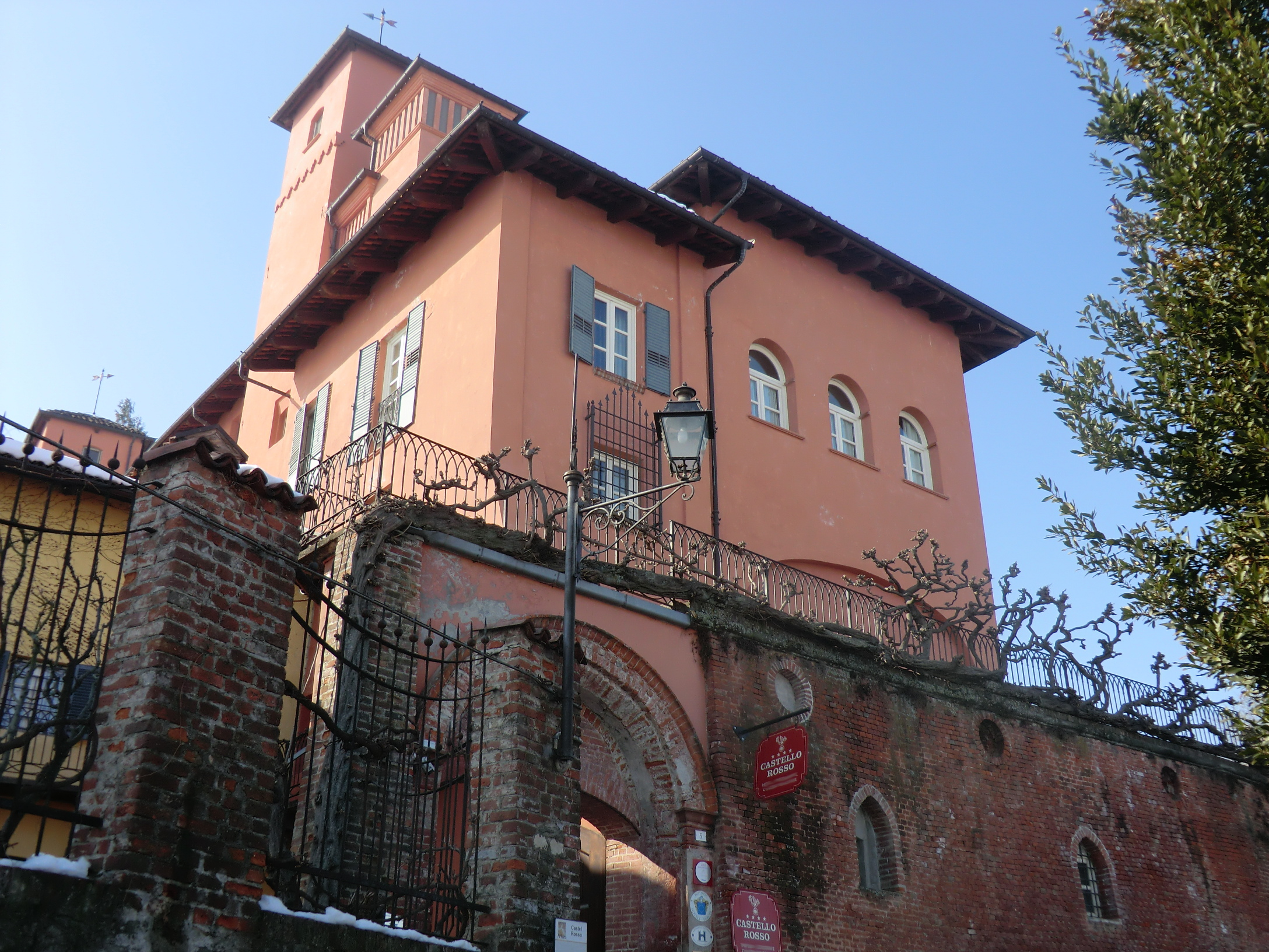 Costigliole Saluzzo (Cuneo): castello Rosso (XVI sec.)